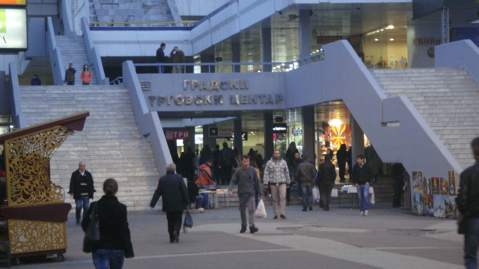 Влезот на ГТЦ (Градски трговски центар) во Скопје